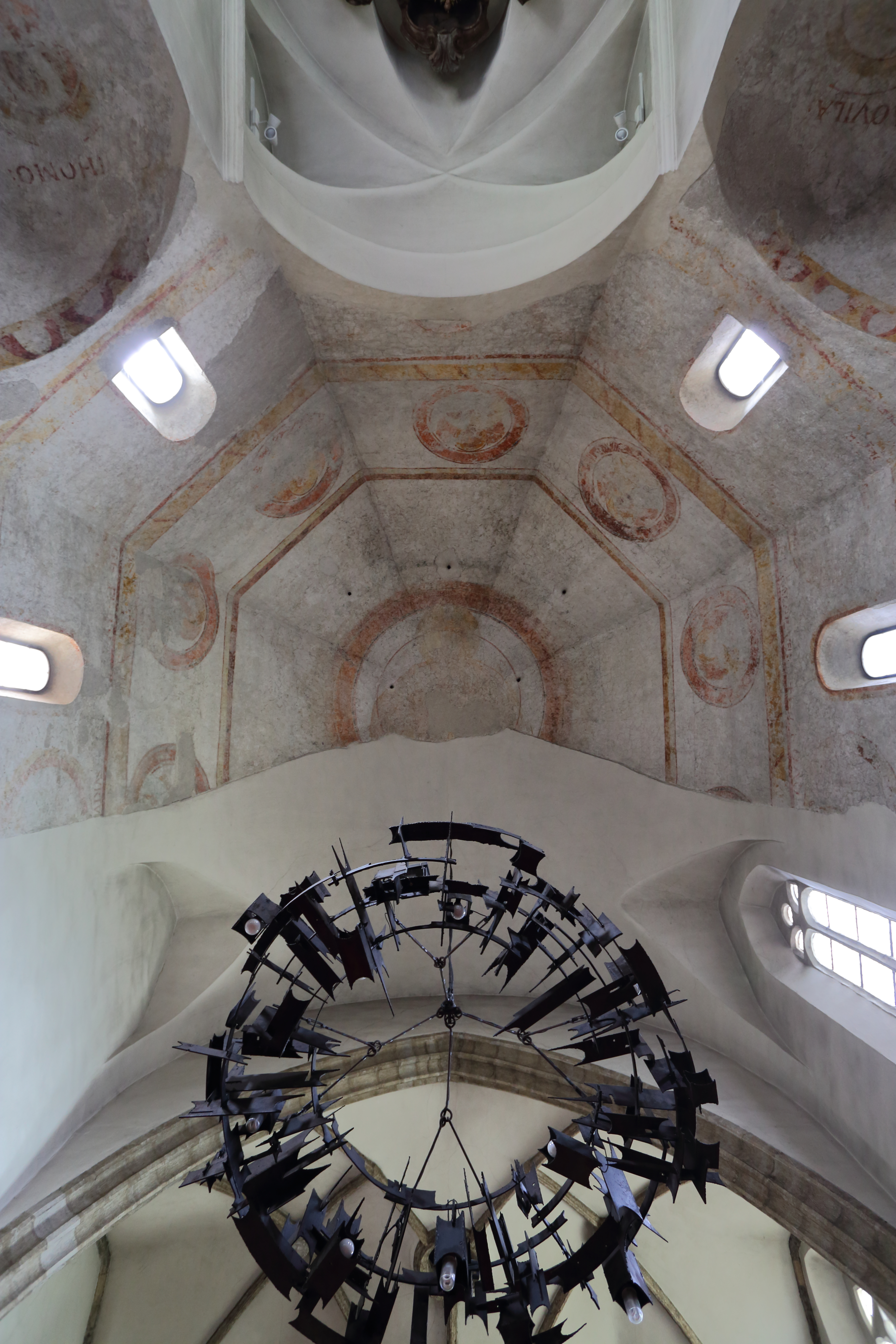 Die Oktogonkuppel des ottonischen Zentralbaues mit dem Übergang zum gotischen Langhauses in der alten Pfarrkirche der niederösterreichischen Stadt Wieselburg. Die Fresken aus der ersten Hälfte des 11. Jahrhundert wurden 1952/57 freigelegt. Der mächtige Radleuchter aus Stahl ist ein Werk von Franz Katzgraber (1926-1998) aus dem Jahr 1968.